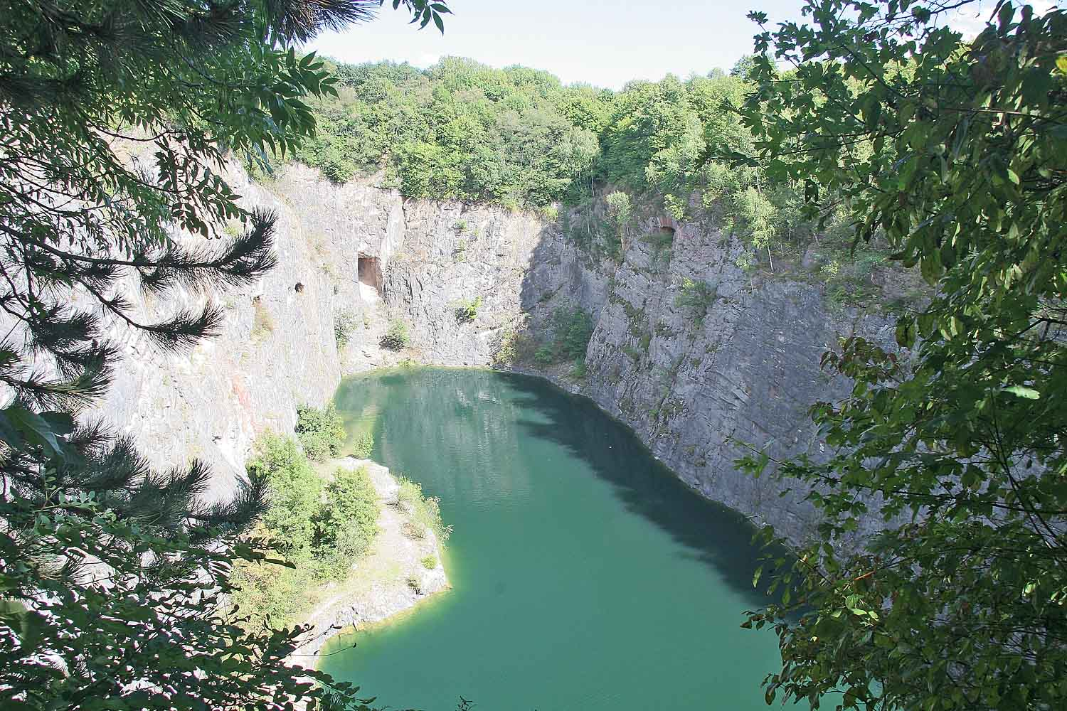 Lom Malá Amerika, District Beroun, Czech Republic autor:Prazak Date: 17. 8. 2006